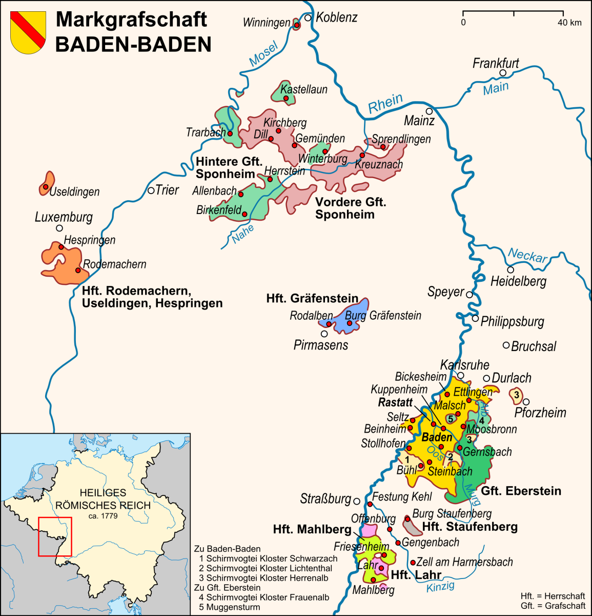 Karte der Markgrafschaft Baden-Baden mit allen Territorien von 1535 bis 1771